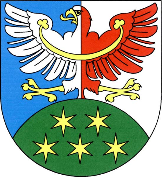 Znak obce Chlum